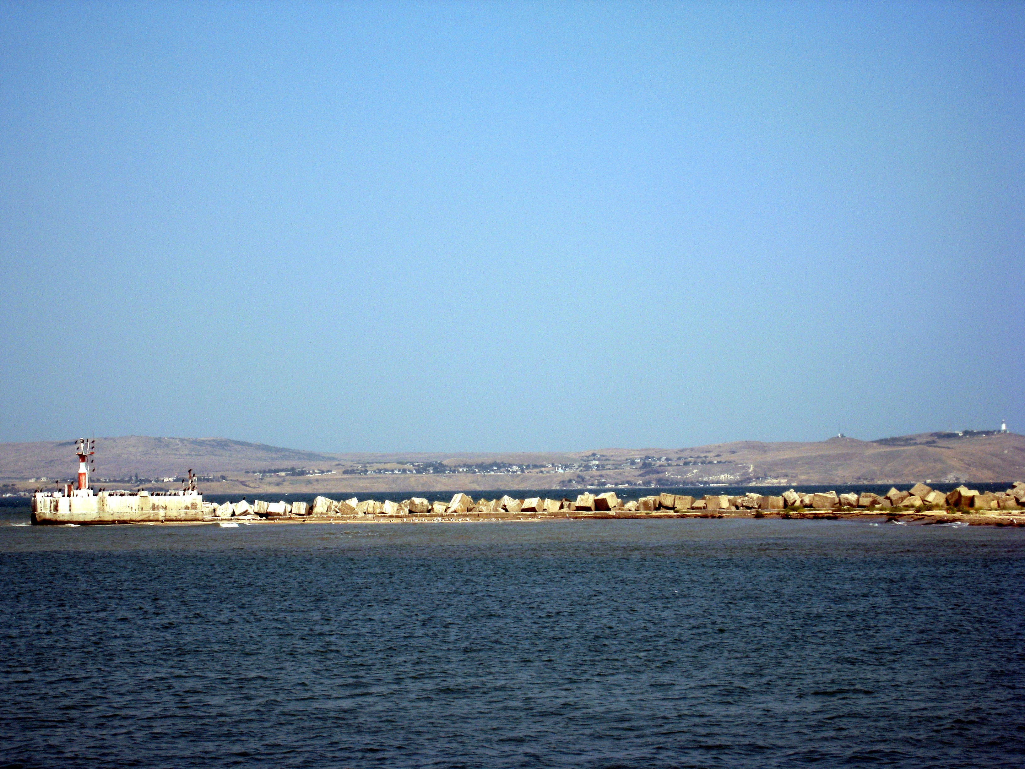 коса Чушка. Входные ворота акватории порта Кавказ.